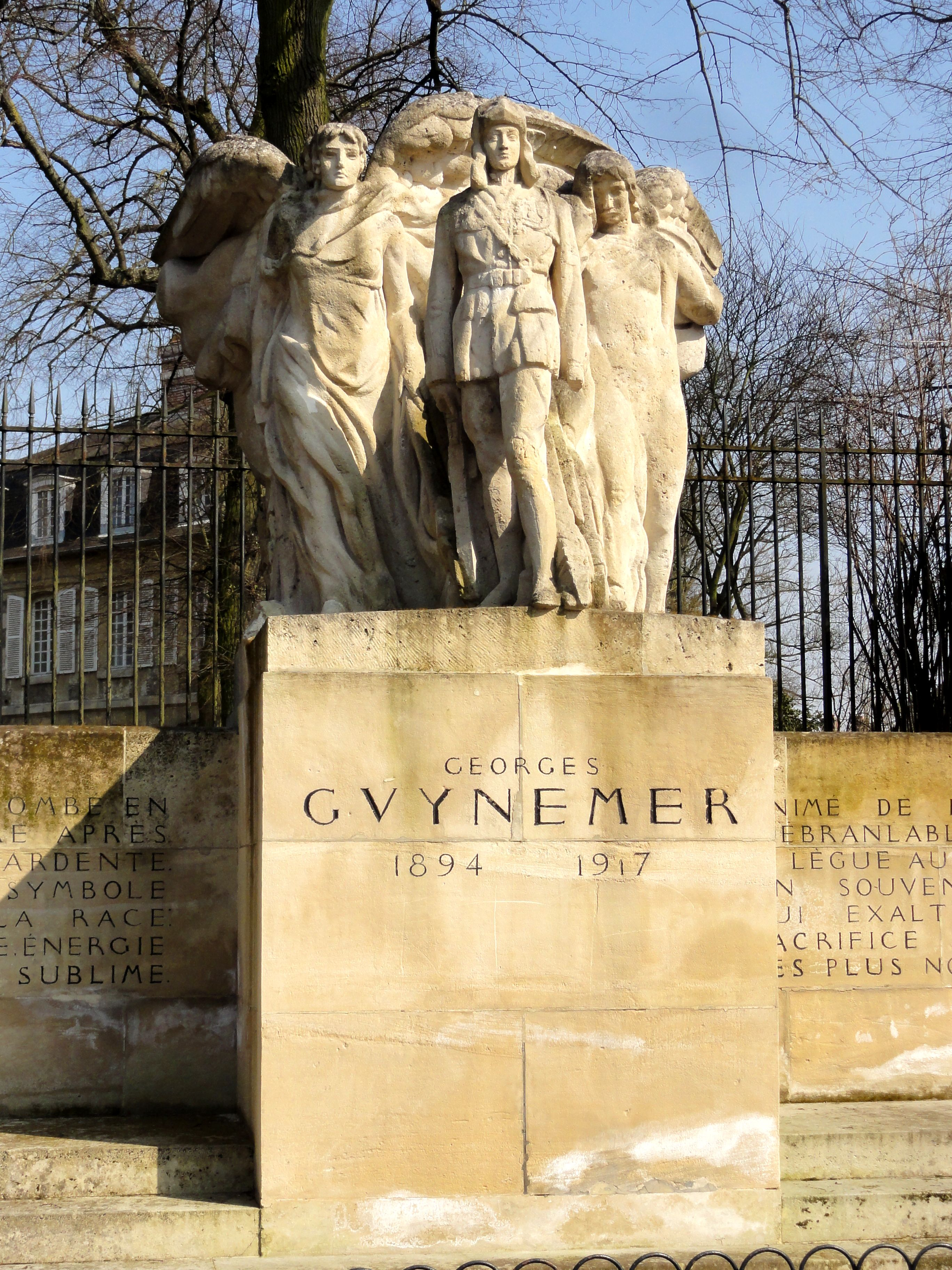 Monument pour Georges Guynemer à Compiègne, à l'angle du boulevard Victor-Hugo (à gauche) avec la rue Saint-Lazare.